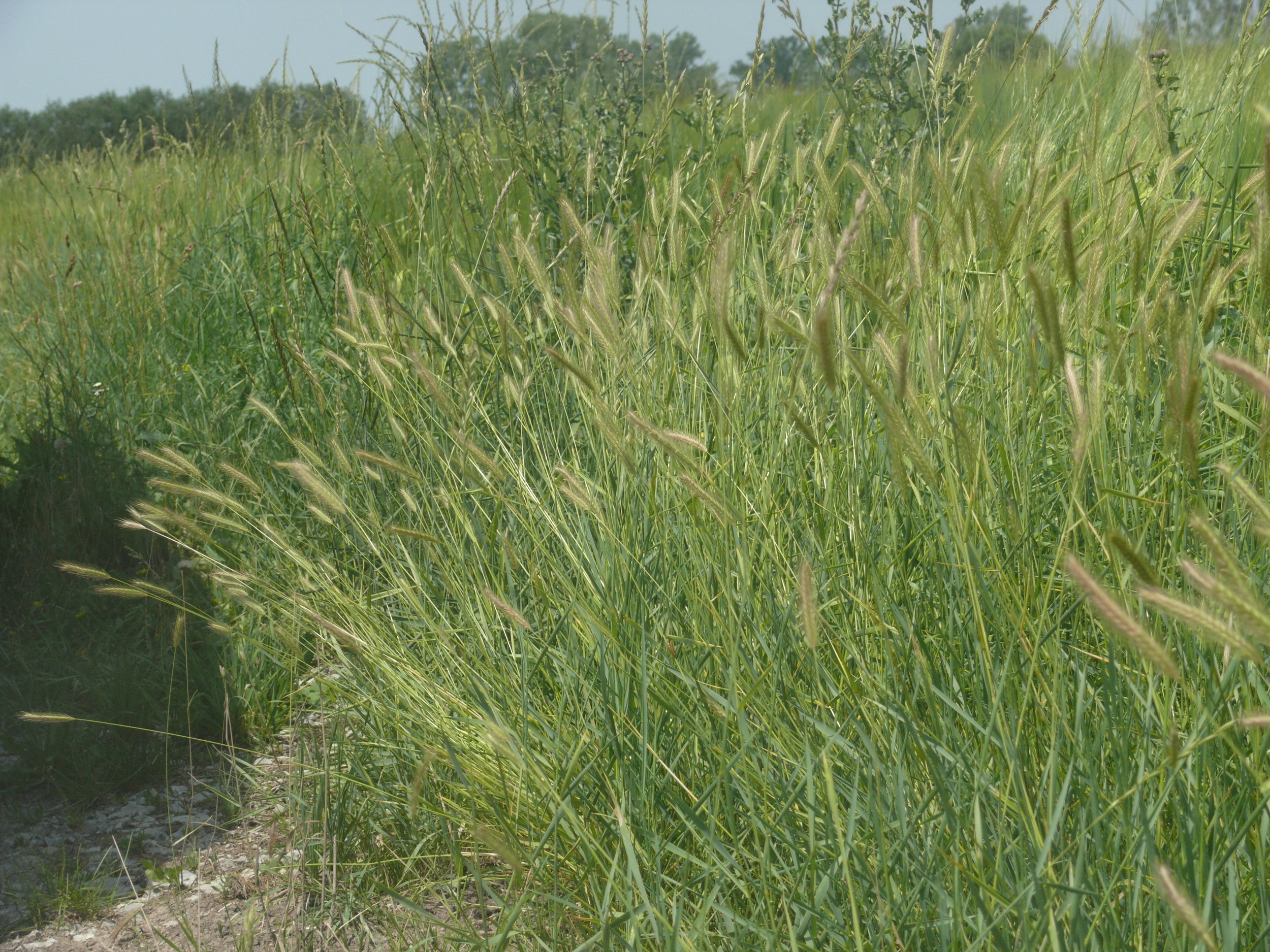 Hordeum secalinum, Hohenlohe